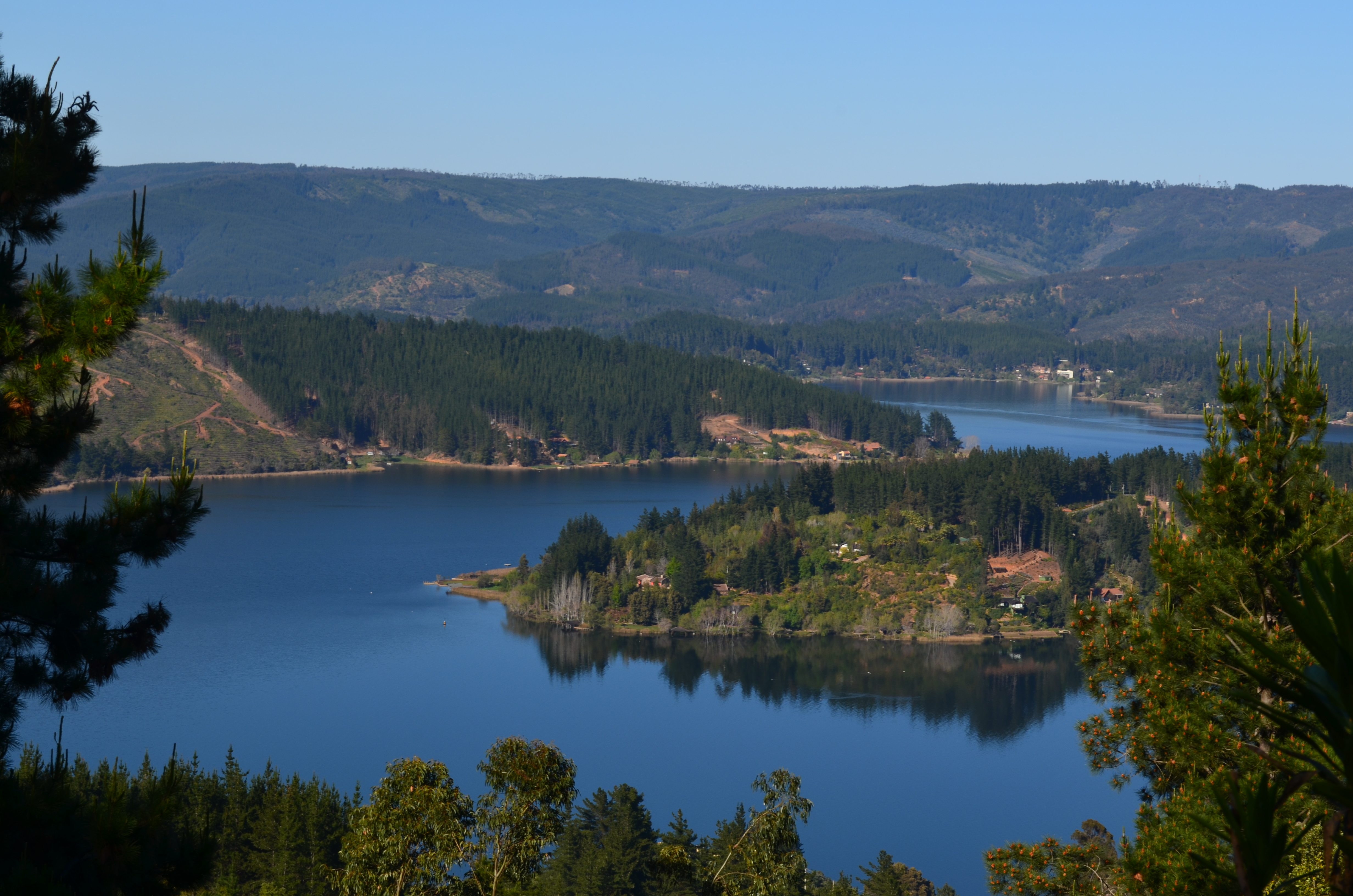 Vista parcial de lago Vichuquén